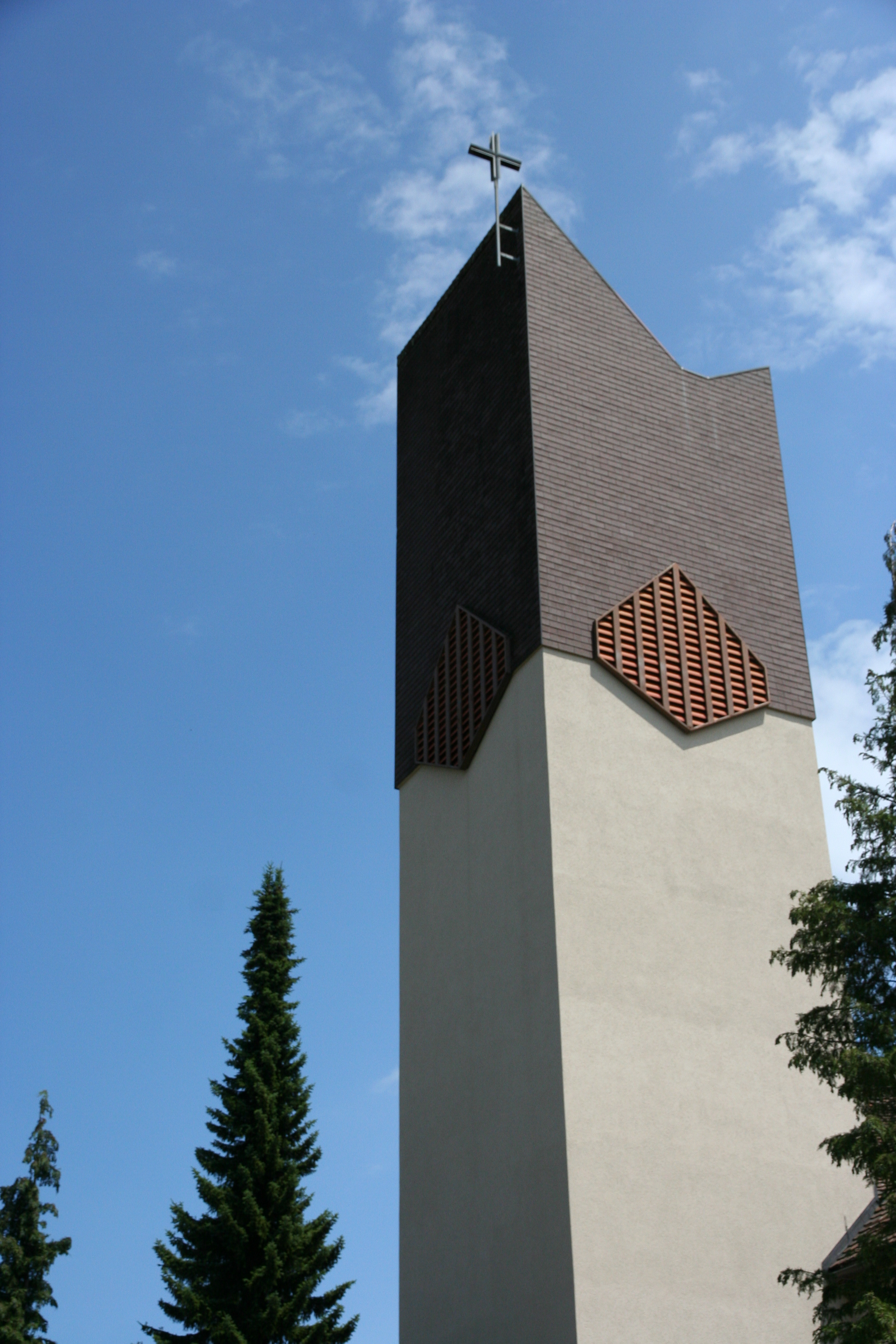 Römisch-katholische Pfarrkirche Liebfrauen Hinwil, Kirchturm